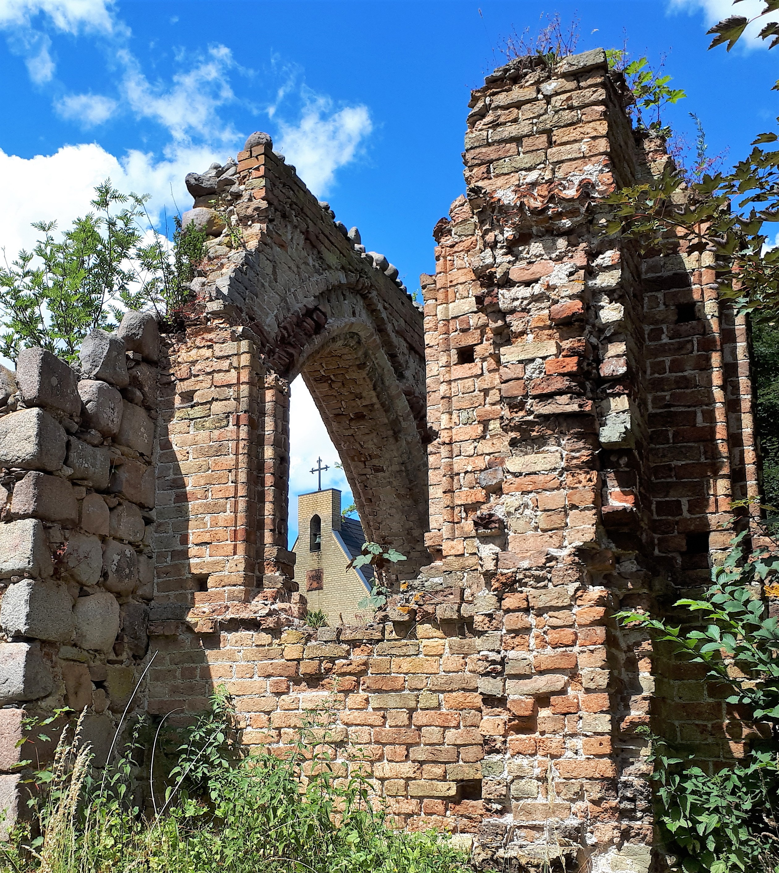 Steinfurther Kirchenruine mit Kapelle